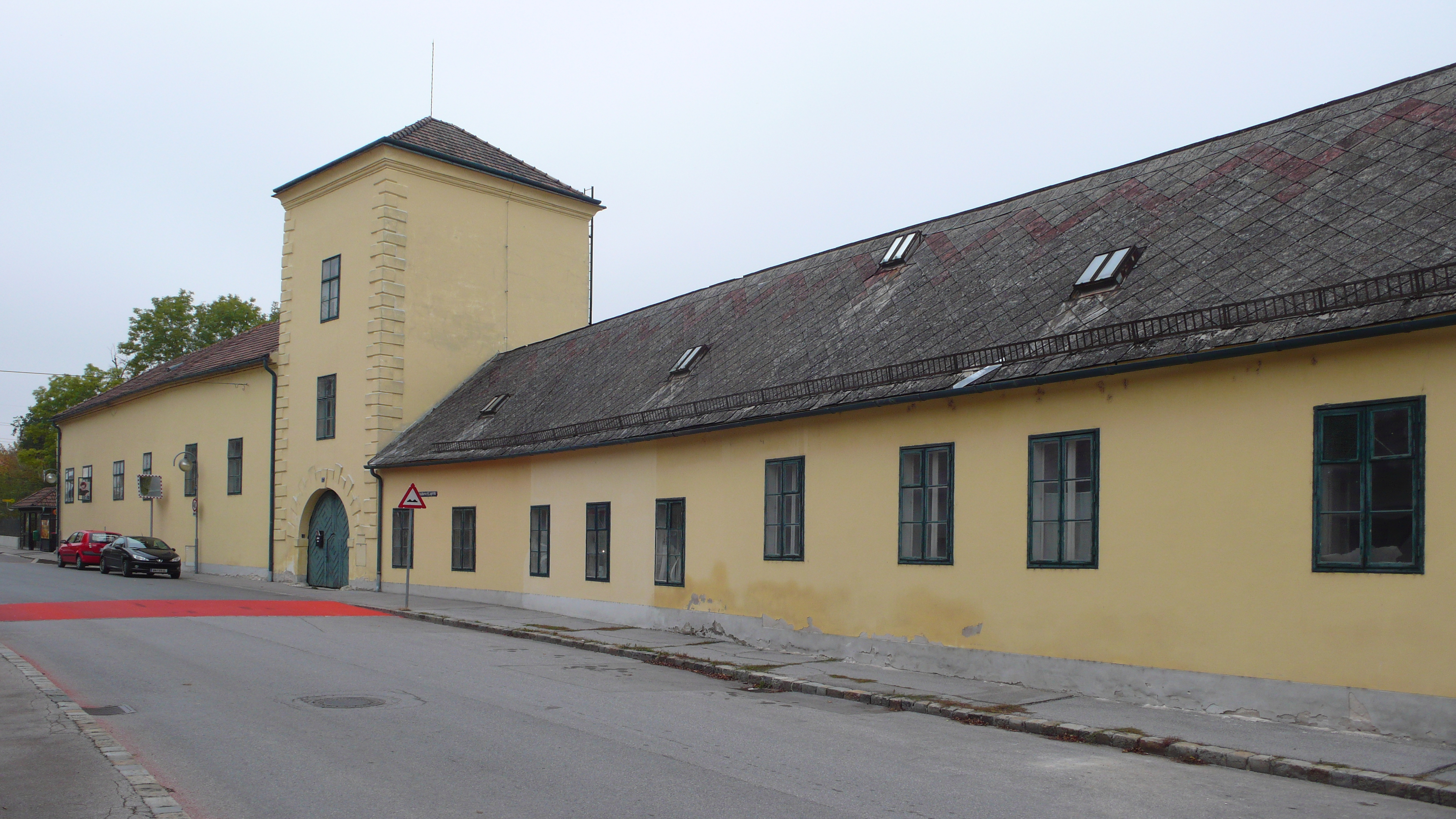 Ehem. Freihof bzw. Herrschaftshaus, ehem. Malzfabrik im Ortsteil Wienersdorf der Stadt Traiskirchen in Niederösterreich